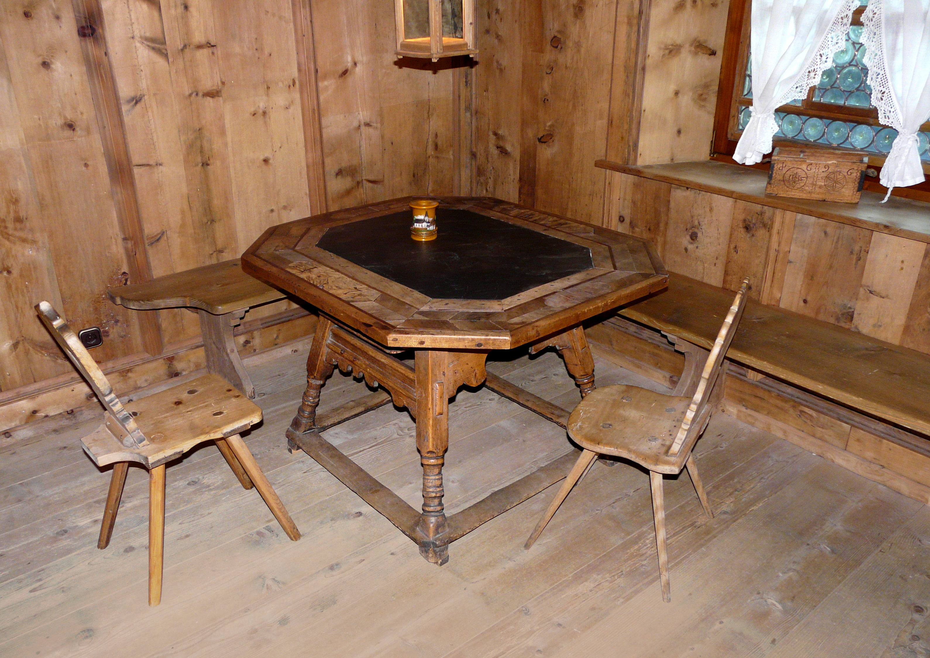 Bildinhalt: Sitzecke mit Eckbank, zwei Stühlen und Montafoner Tisch in der Lukas-Tschofen-Stube in Gaschurn Aufnahmeort: Gaschurn, Montafon, Österreich